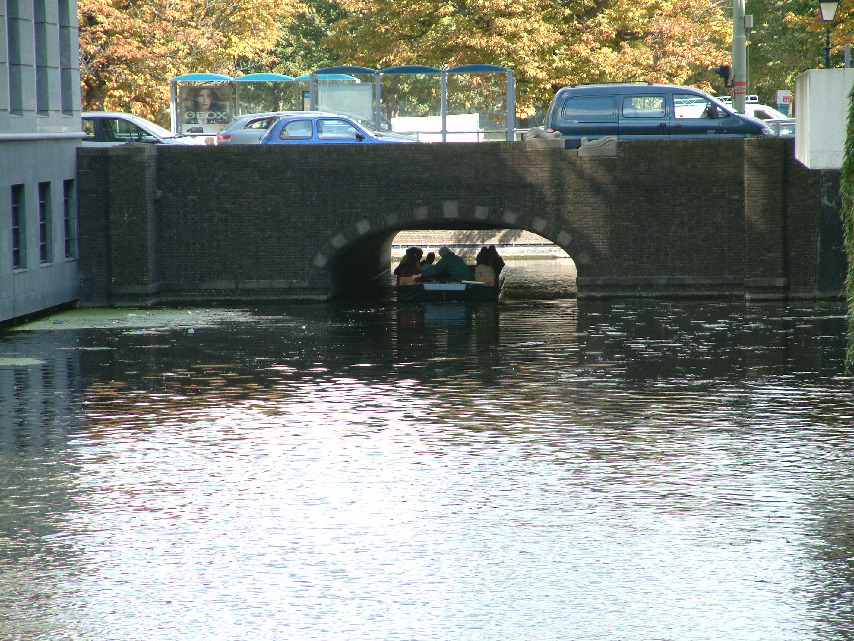 Brug in Den Haag